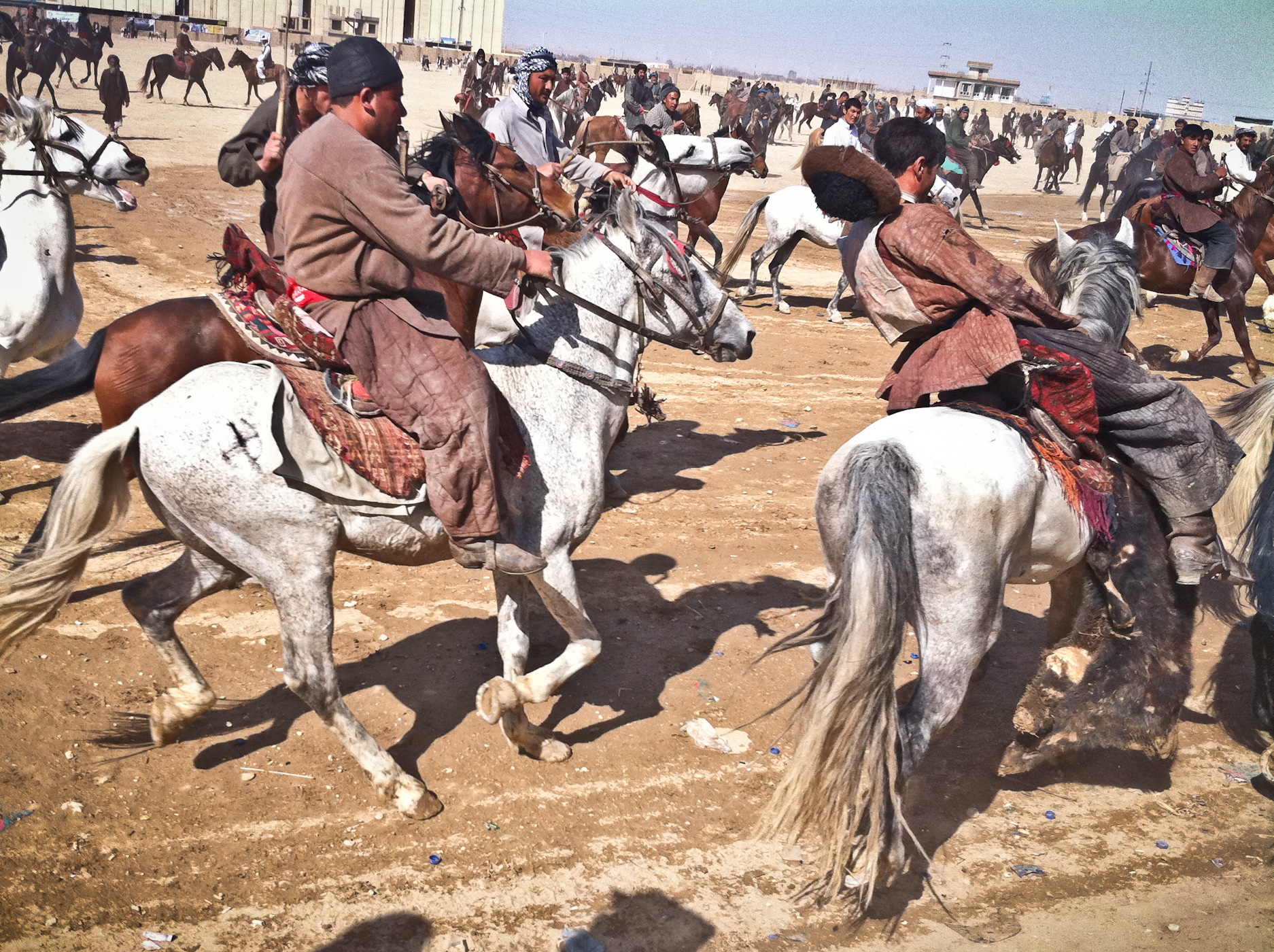 Nowruz Buzkashi Match in Mazar